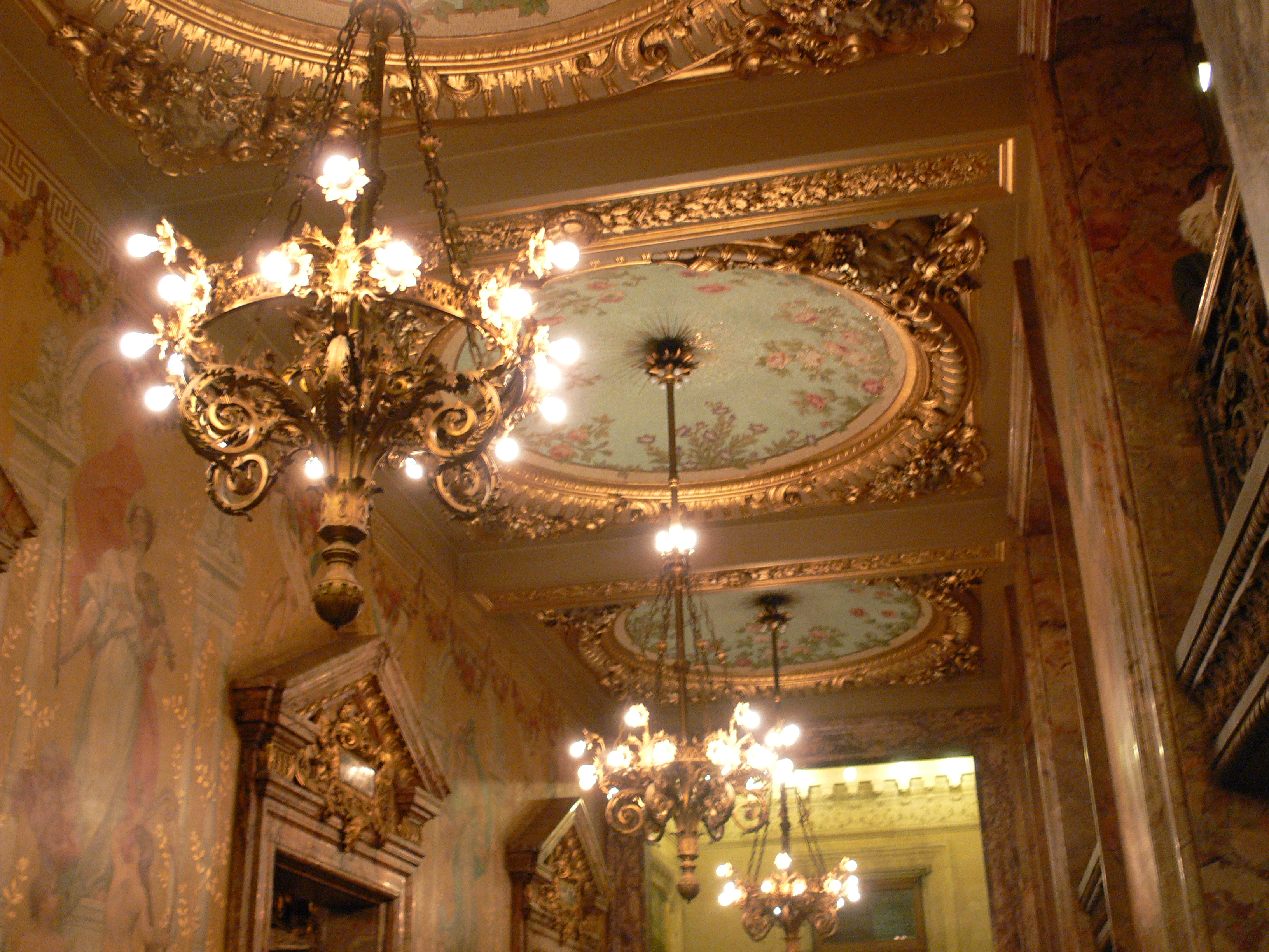 Salle Favart (Opéra-Comique), Paris